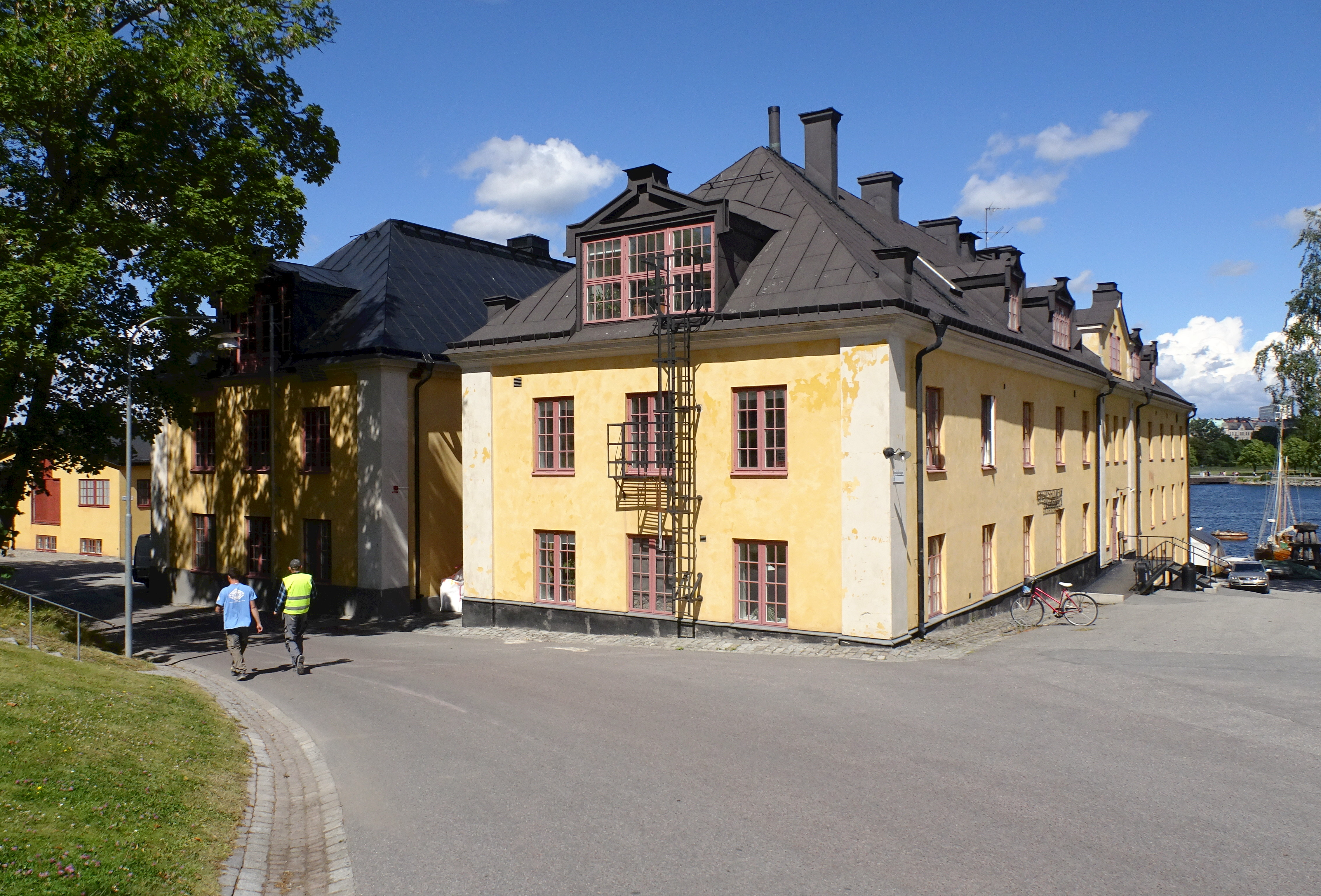 Norra och Södra fundamentet, Skeppsholmens Folkhögskola